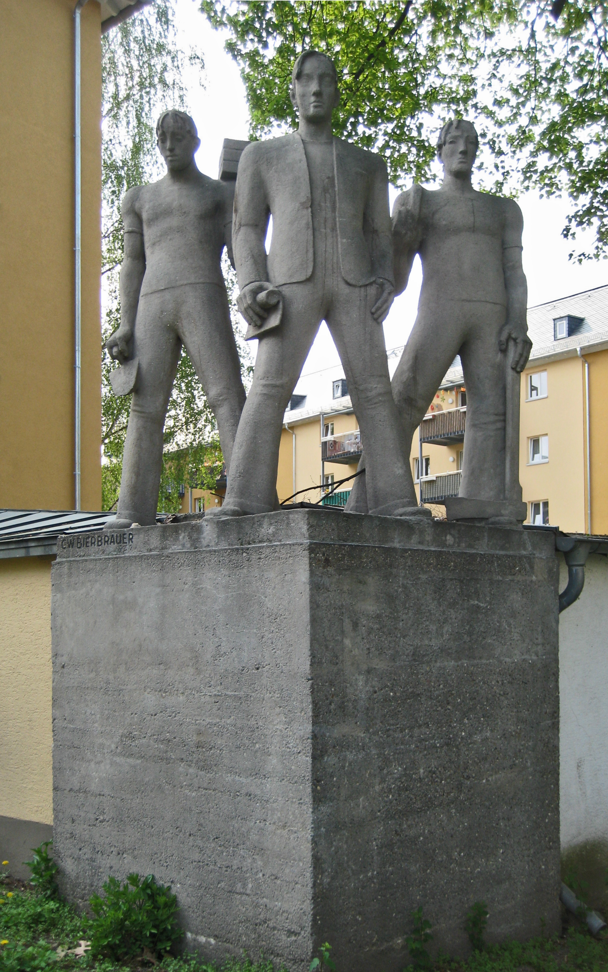 Bauarbeiterdenkmal im Wiesbadener Rheingauviertel von Carl Wilhelm Bierbrauer, (1924)